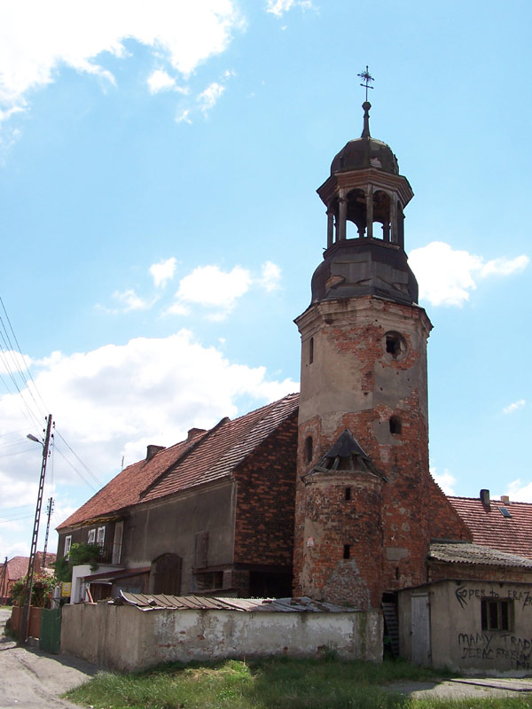 Wieża w centrum Przedmościa